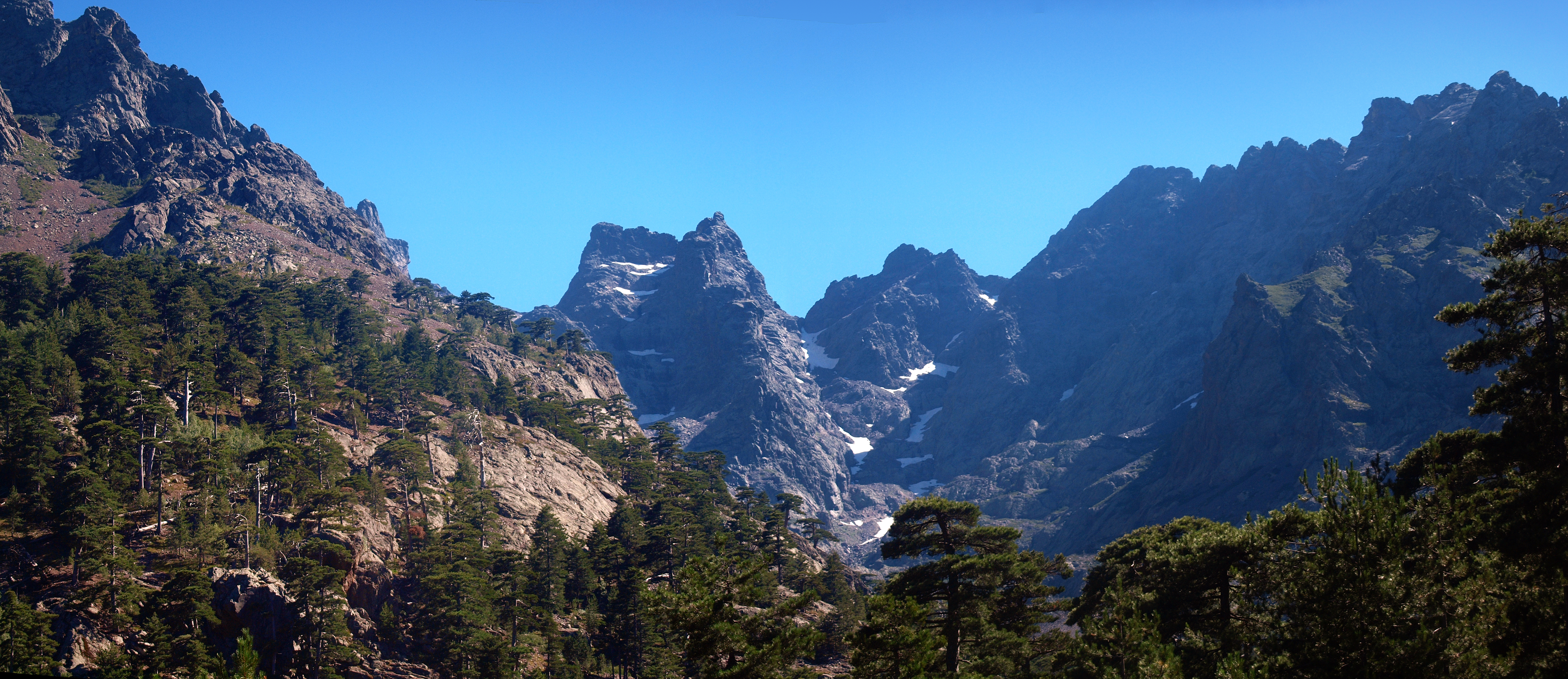 Asco (Corsica) - Haut-Asco (Cirque de Trimbolacciu, Punta Minuta, Capu Rossu et Capu Larghia)